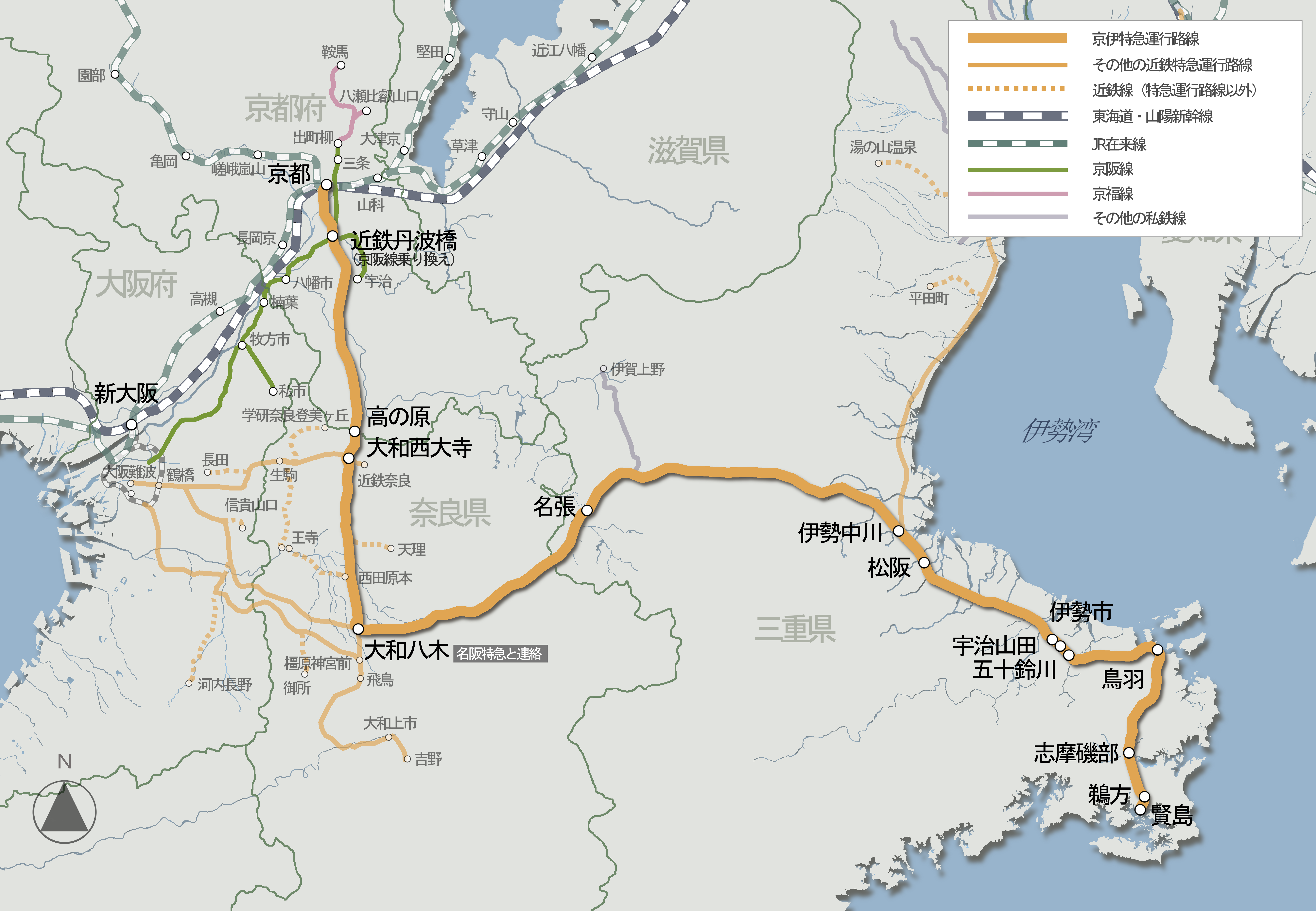 近鉄京伊特急ルートマップ